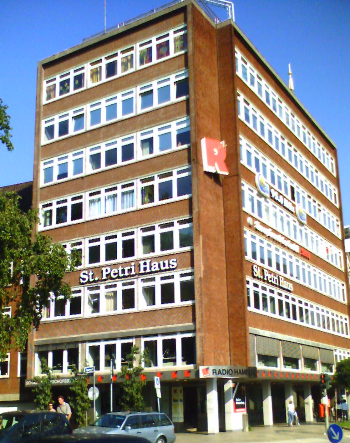 Radio Hamburg am Speersort in Hamburg-Altstadt.